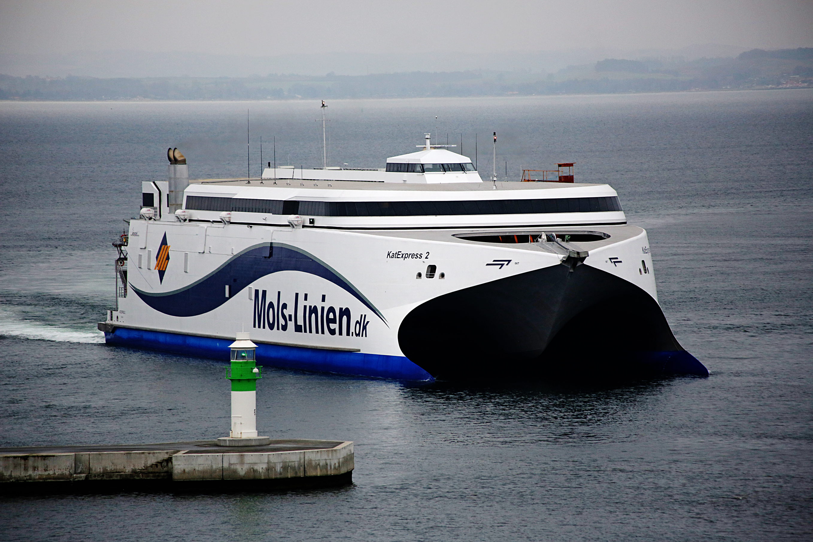 Mols-Linien